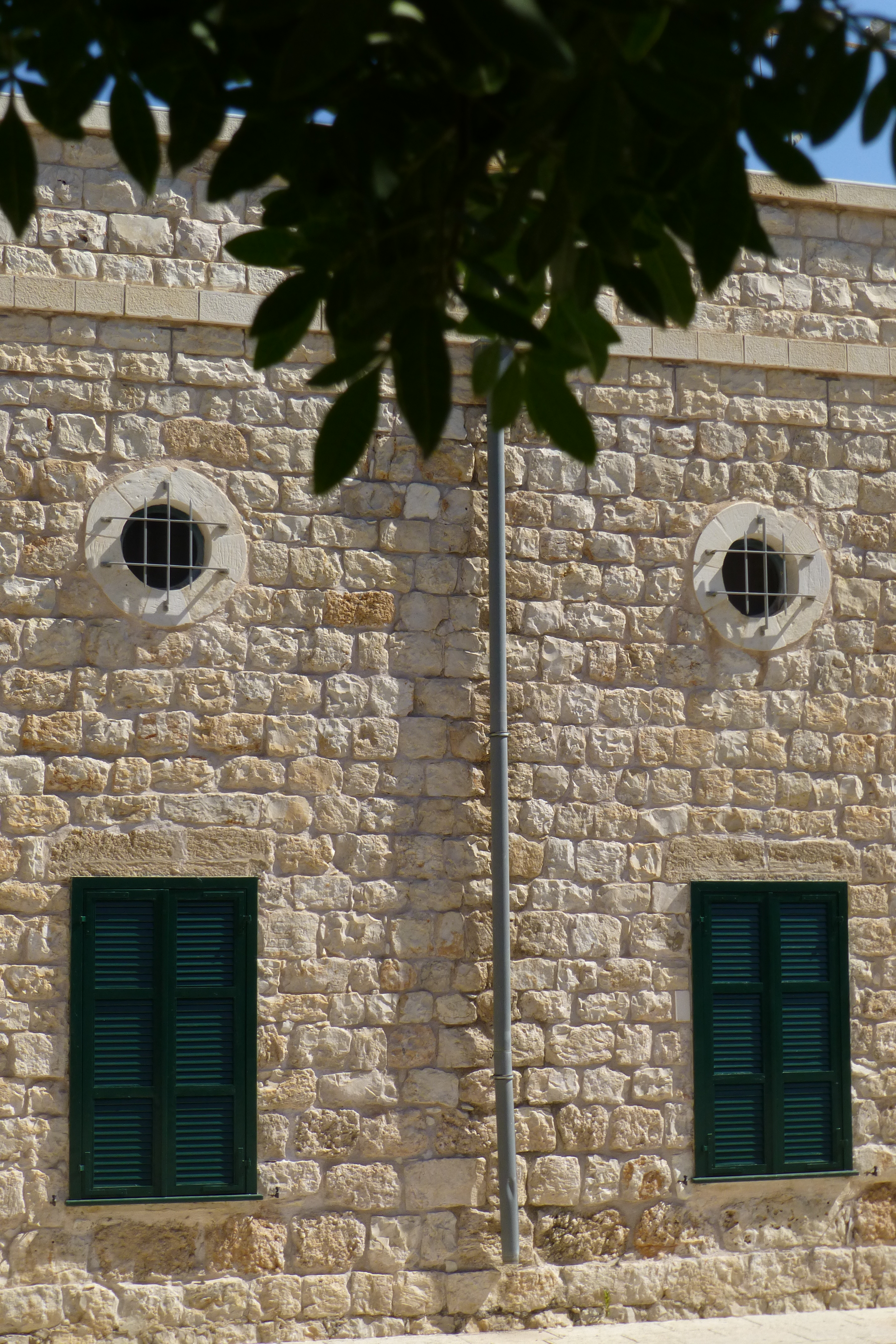 מוזיאון העיר הוא מוזיאון העוסק בתרבות אורבנית ובתיעוד ובהצגת ההיסטוריה של העיר חיפה, . המוזיאון נפתח בנובמבר 2000, והוא ממוקם במבני בית העם הטמפלרי ובית הספר הטמפלרי. המוזיאון הוא חלק ממוזיאוני חיפה. בית העם הטמפלרי הוקם בשנת 1869 והיה הבניין הראשון שהקימו הטמפלרים בארץ.